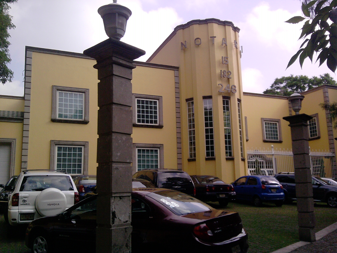 Notaria Pública en el Distrito Federal.